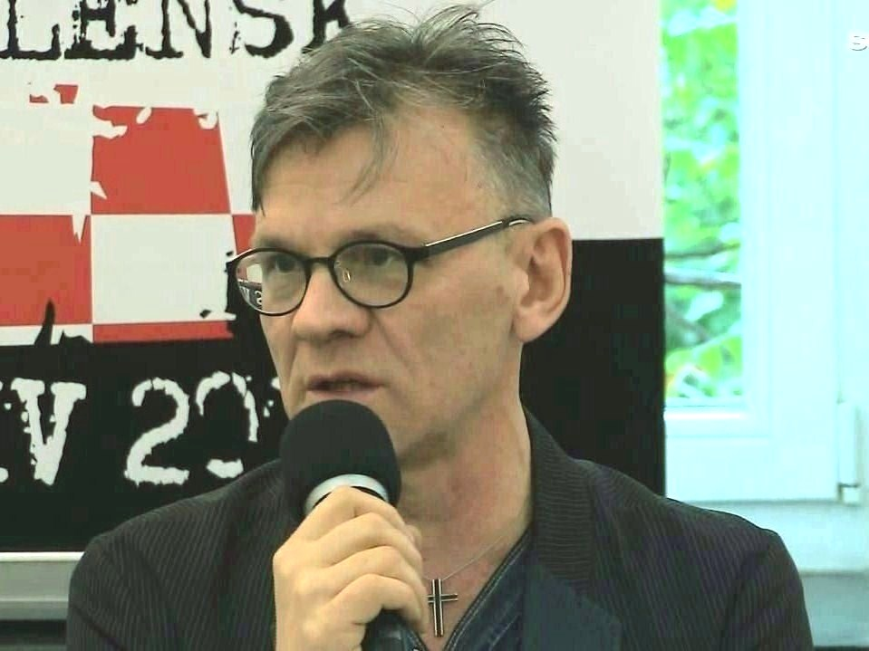 Maciej Pawlicki, producent telewizyjny i filmowy, reżyser, scenarzysta, publicysta i polityk.